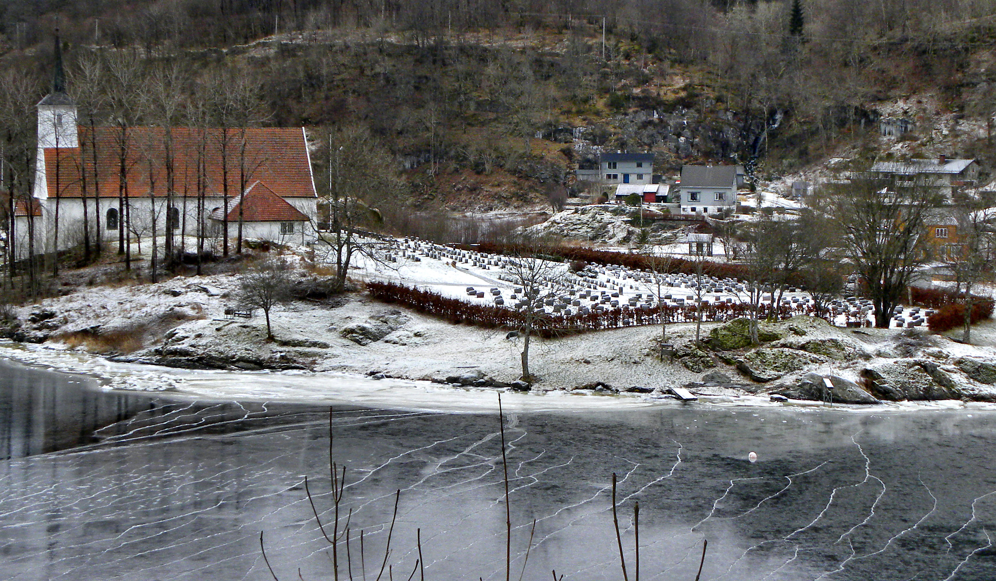 Hosanger kirke og kirkegård ved Mjøsvågen i vinterdrakt 16. jan. 2013.